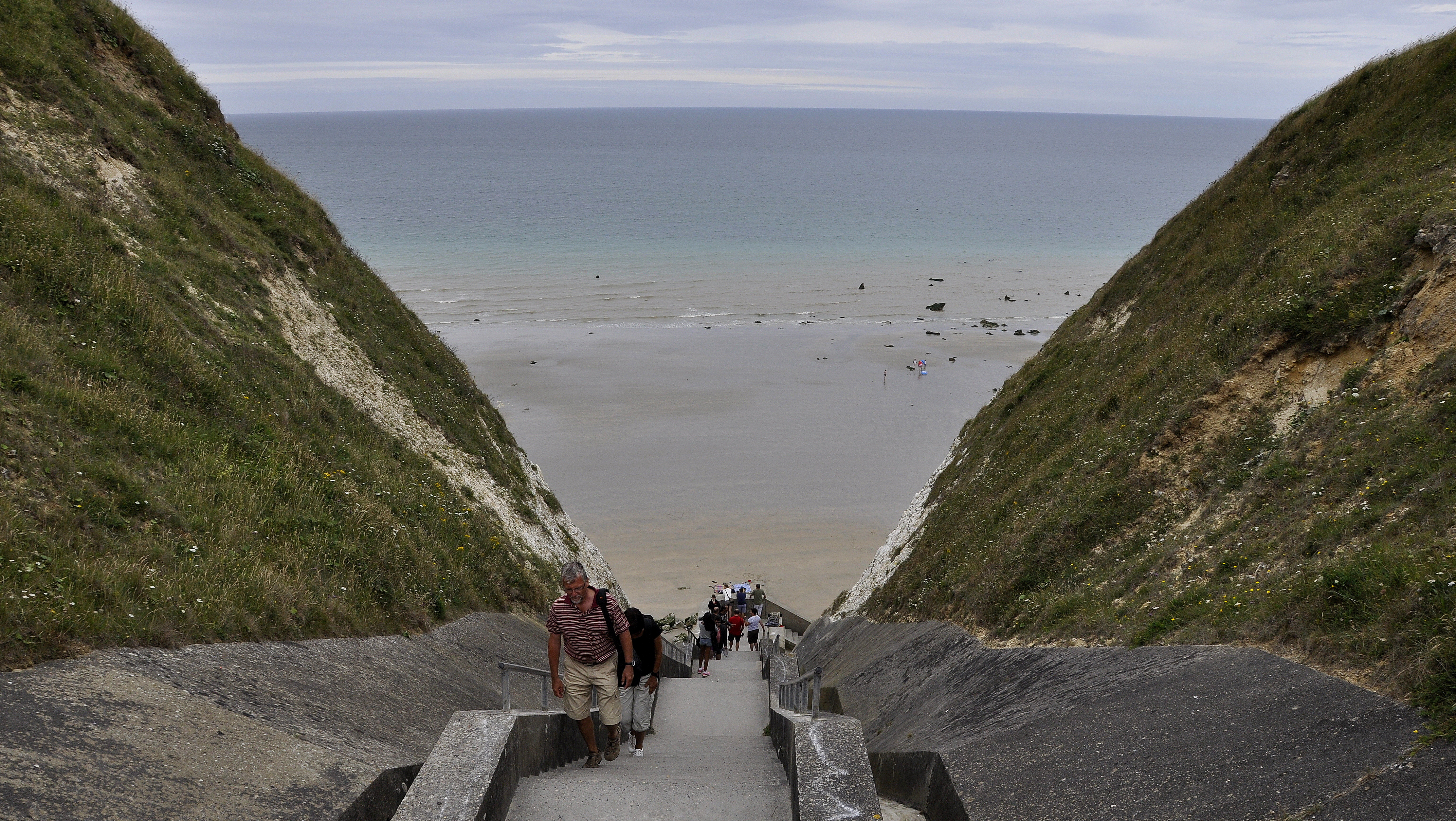 Sotteville-sur-Mer, Frankrijk. 231 trappen naar het strand